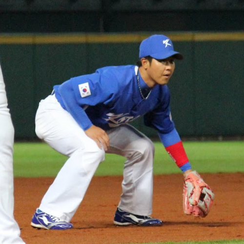 Jeong Choi